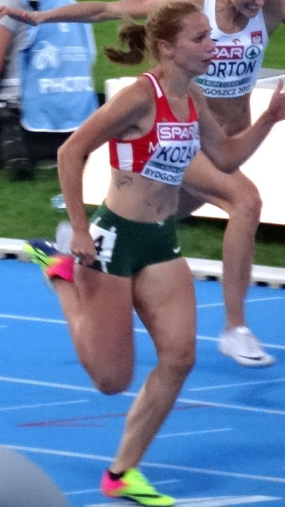 Młodzieżowe Mistrzostwa Europy w Lekkoatletyce U23 w Bydgoszczy 13-16 lipca 2017, półfinał biegu na 100 m przez płotki kobiet